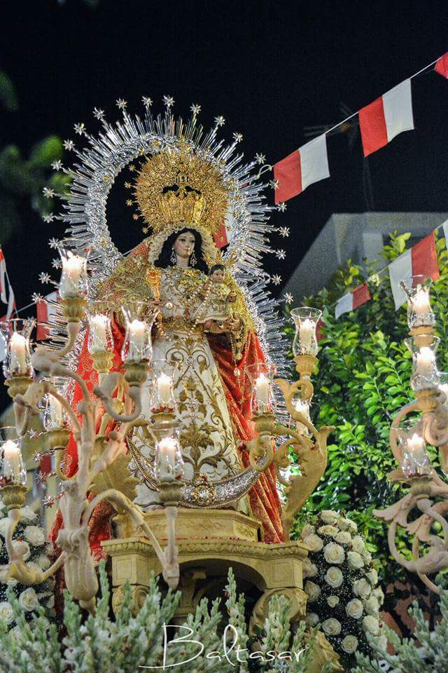 Ntra.Sra del Rosario en su paso procesional Foto:Baltasar Núñez